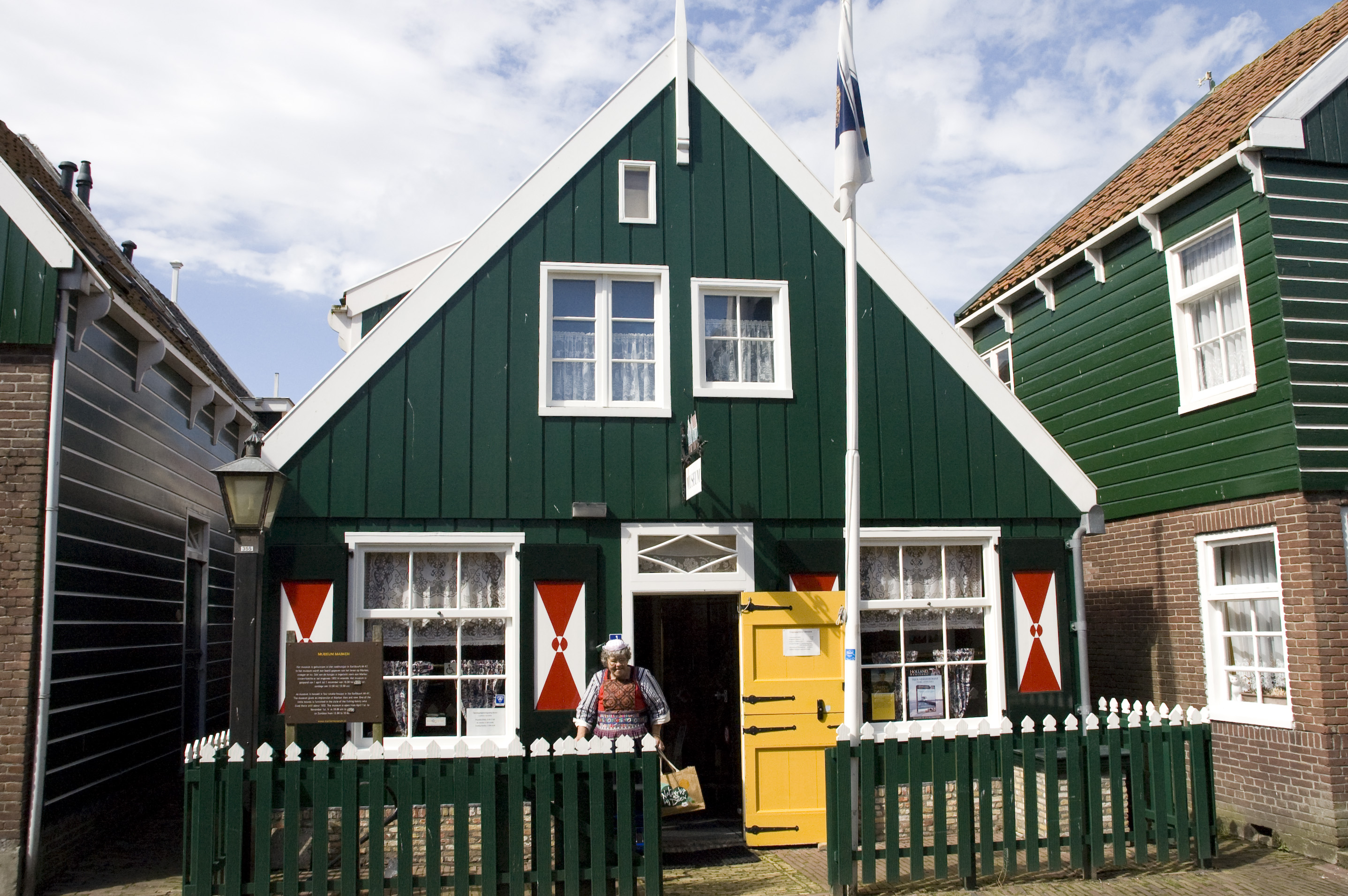 Het marker Museum is volgens de beschrijving op het bord voor de deur gevestigd in de nummers 44 - 47, de oorspronkelijke nummering is onduidelijk maar het gehele blok van voor tot achter heeft waarschijnlijk de rijks monumenten nummers 28222 t/m 28227 dus inclusief de huisnummers 42 en 43 die niet meer bestaan.